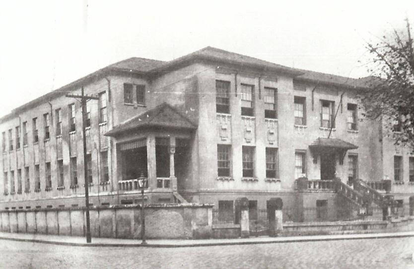 Escola Estadual Amadeu Amaral, no Belenzinho - São Paulo, SP, Brasil.